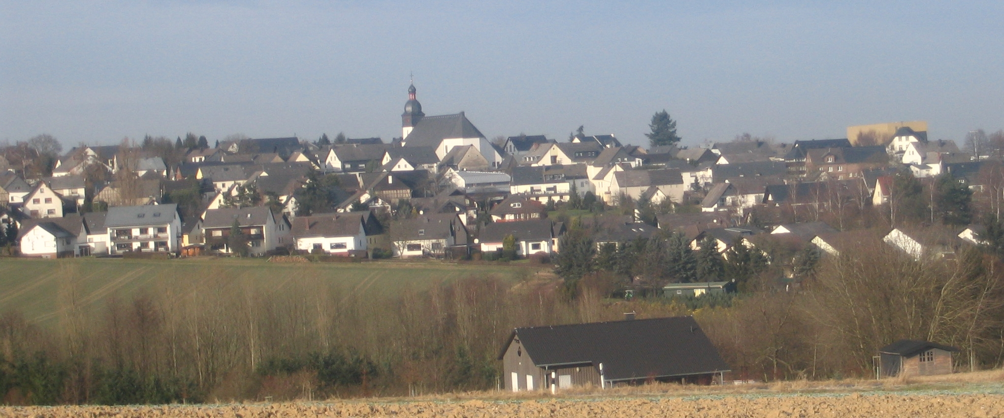 Mastershausen aus Richtung Süden